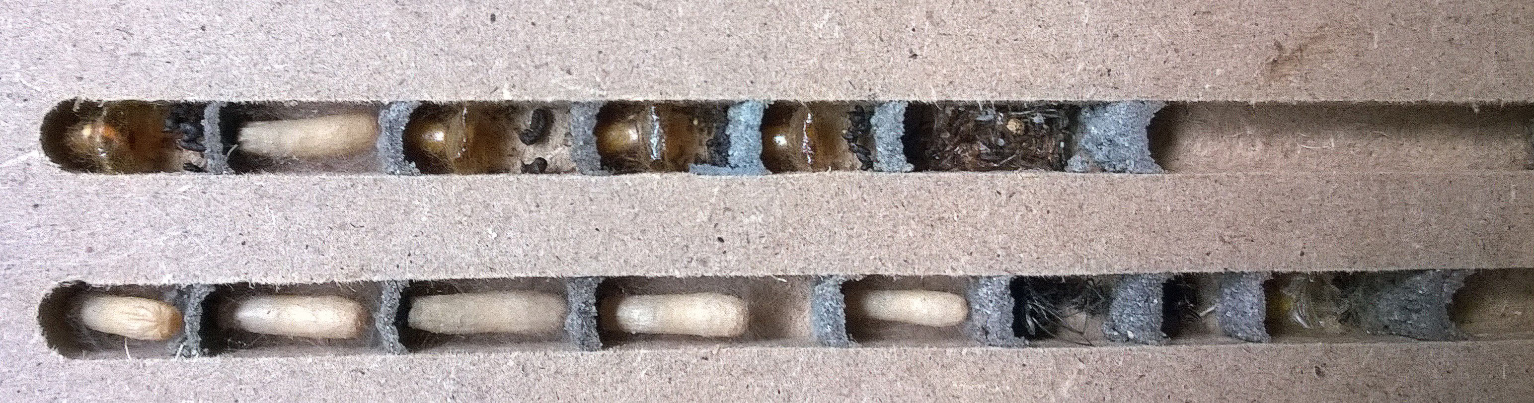 Ungewöhnlicher Besatz in einem Nistbrett für Mauerbienen